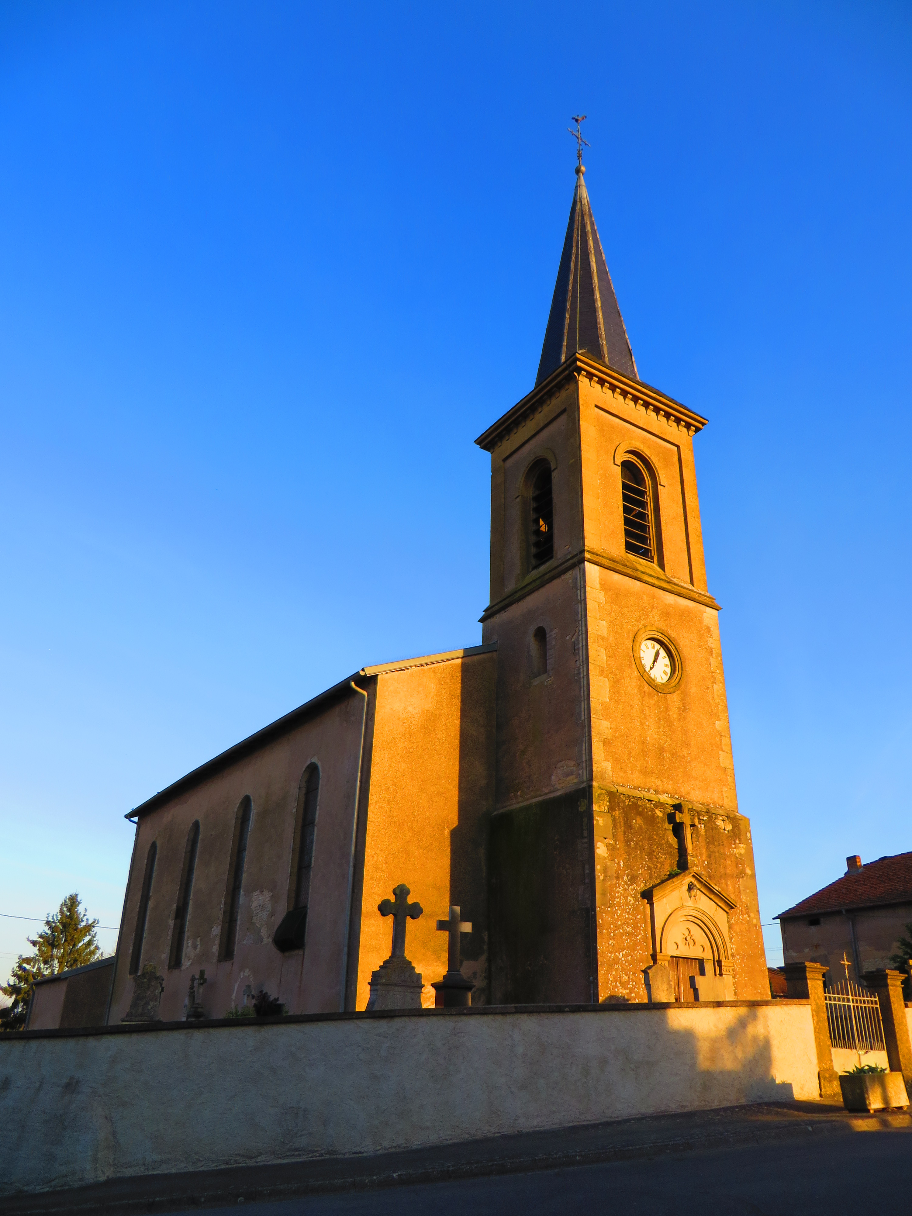 Achain Église Saint-Michel